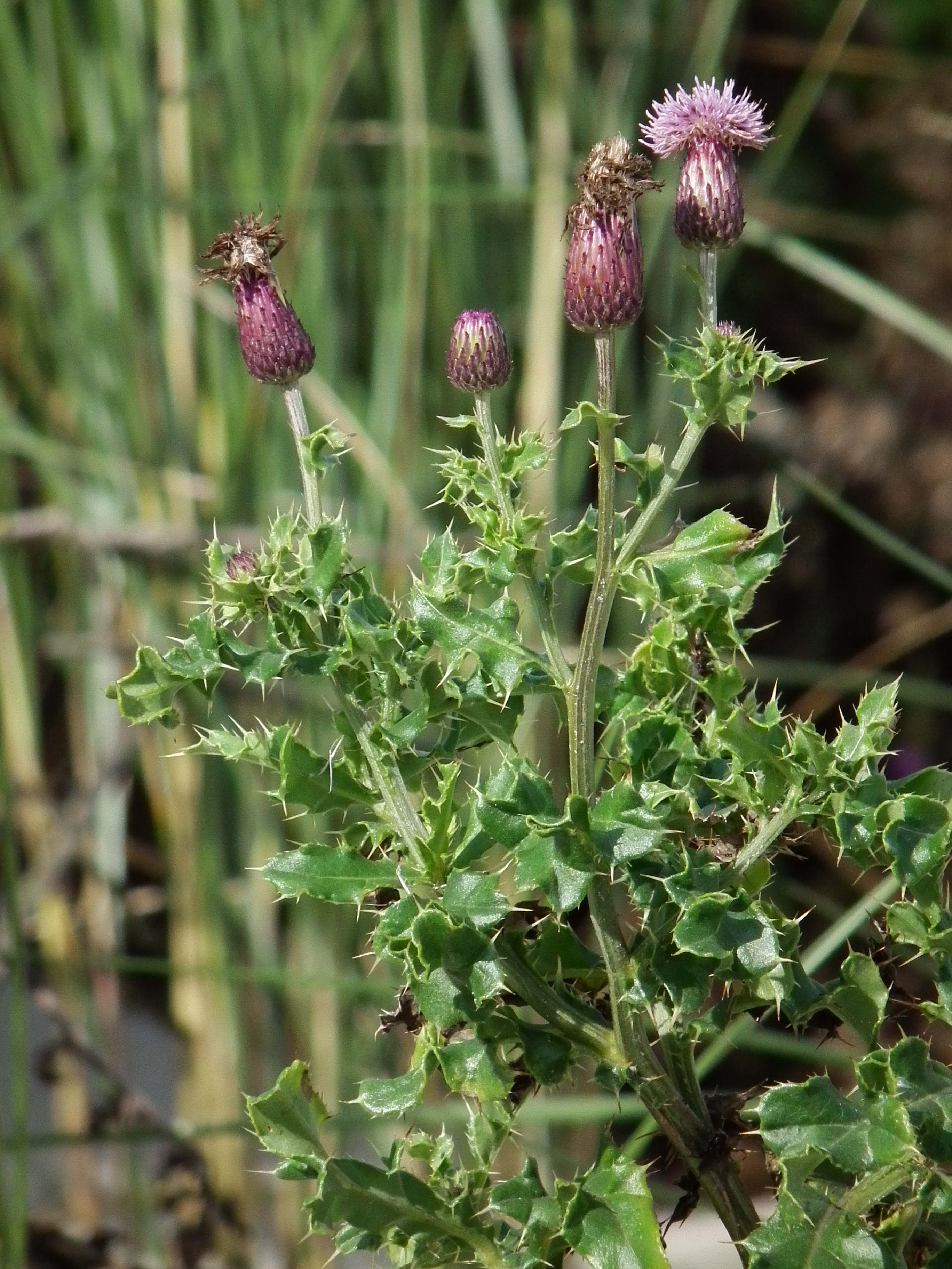 Blüten der Acker-Kratzdistel (Cirsium arvense) im Dünenbereich auf der ostfriesischen Nordseeinsel Juist (Niedersachsen, Deutschland)